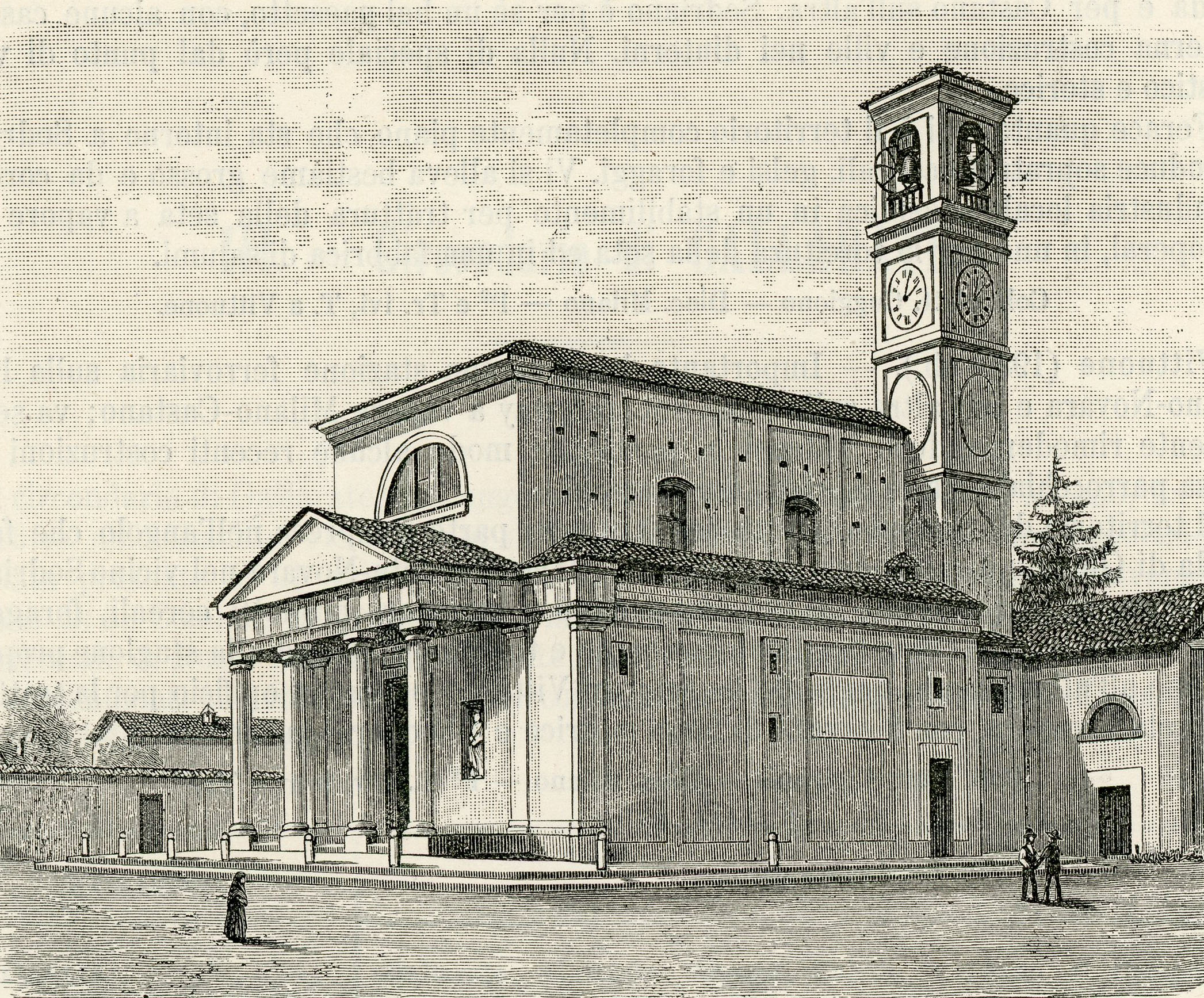 Marcallo: chiesa parrocchiale (xilografia).